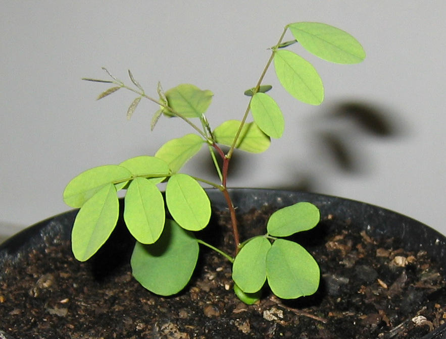 Foto di piantina di Robinia di un mese fatta da me